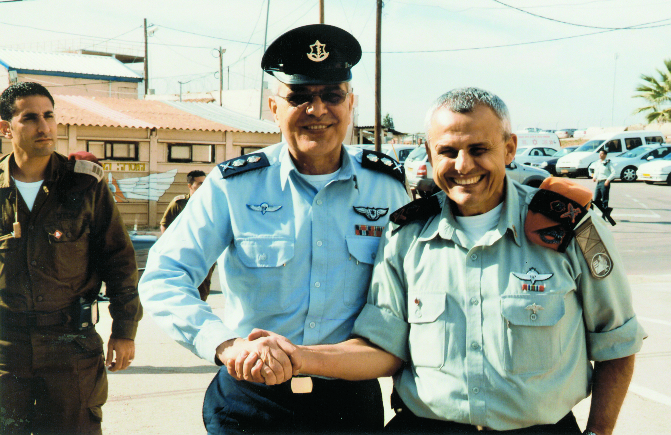 מפקד פיקוד העורף- אלוף יצחק גרשון עם דן חלוץ.